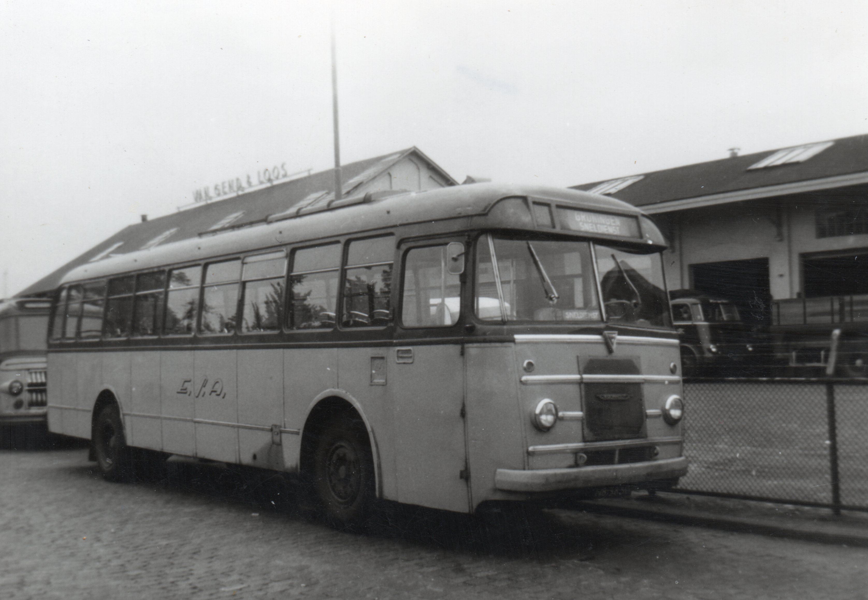 ESA-bus 42, ex HTM 217, Kromhout TB50-DAF/Verheul, te Groningen Autobusstation, 22 augustus 1965